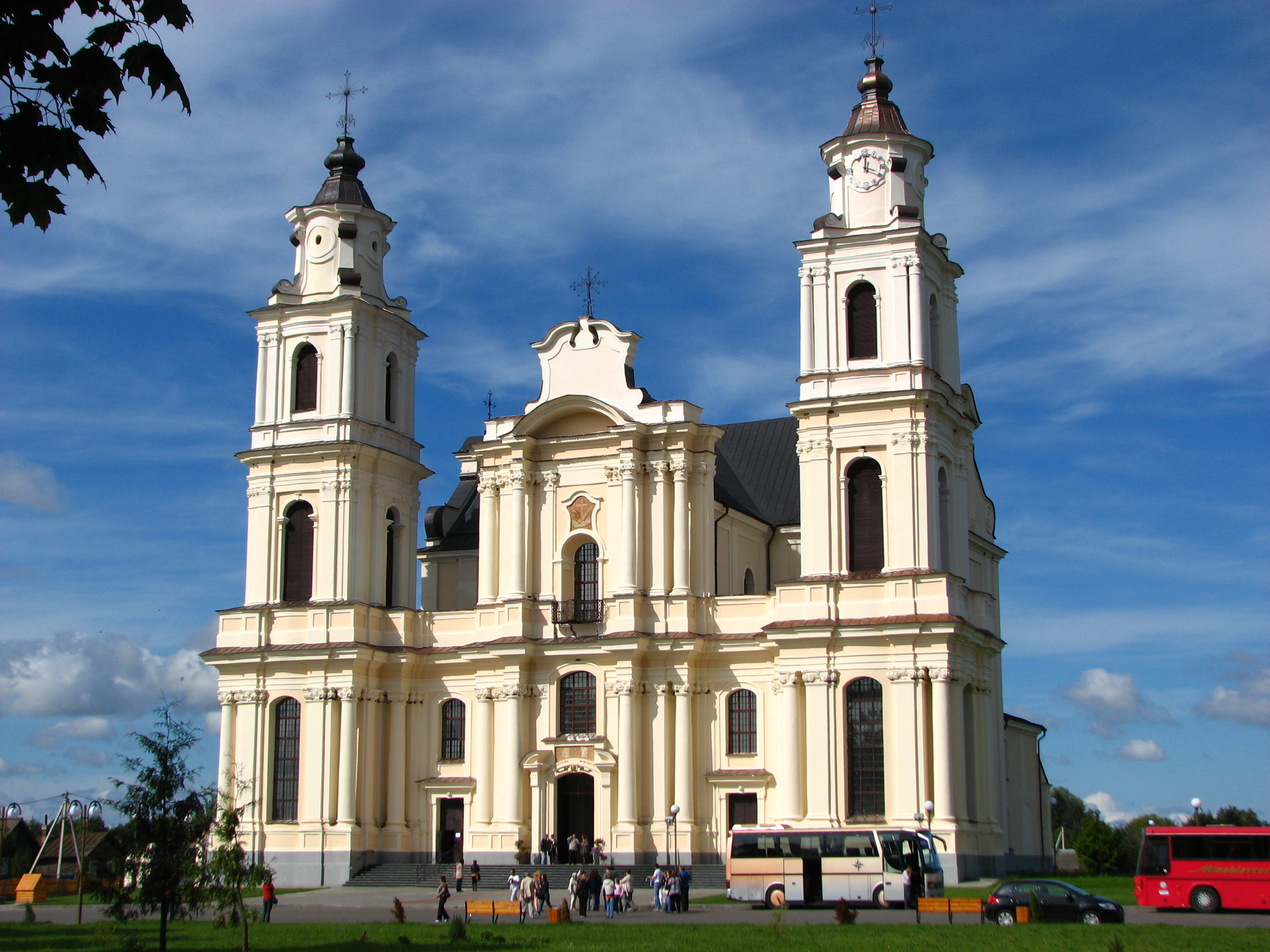 Budslaw. Belarus